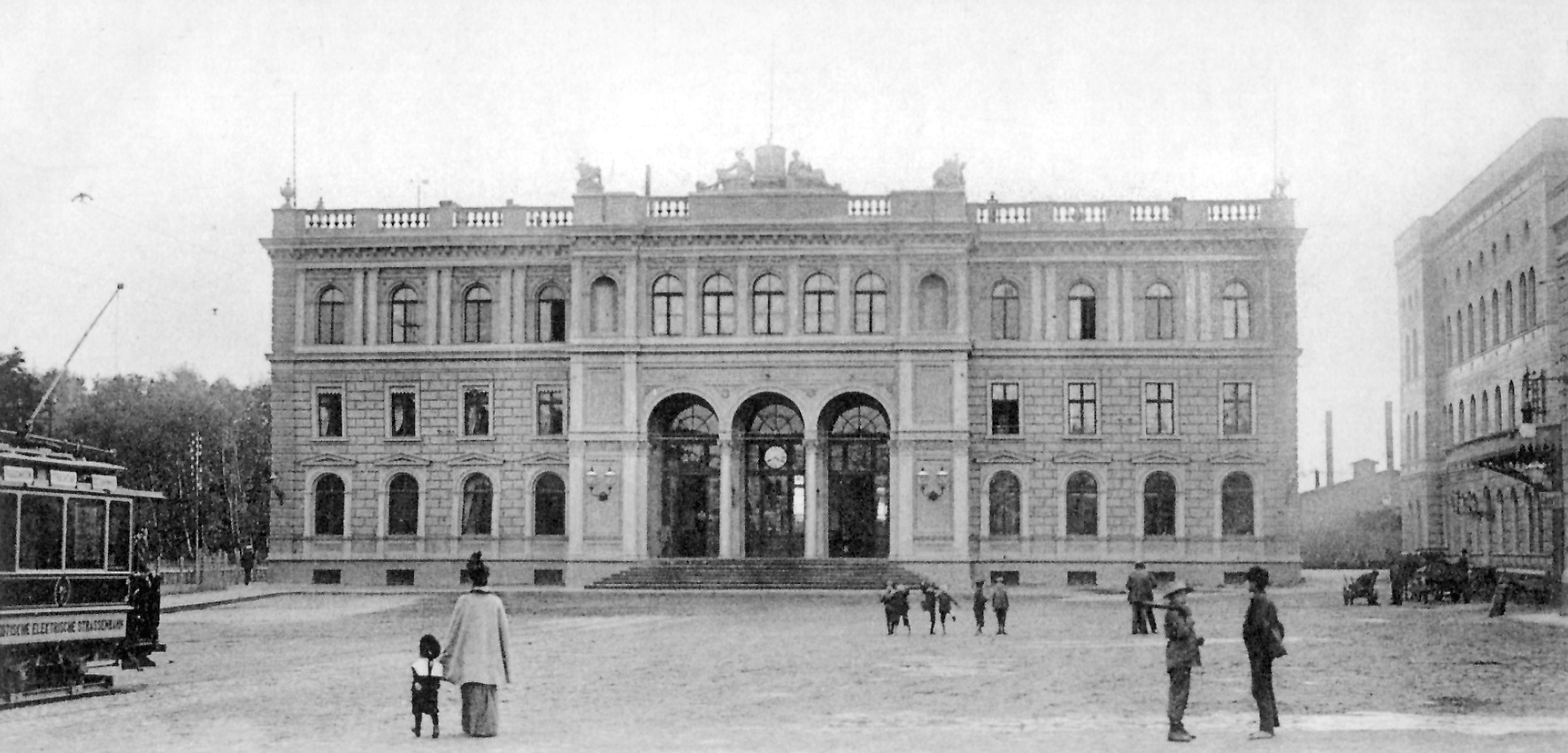 Postkarte vom Südbahnhof Königsberg, Ostpreußische Südbahn